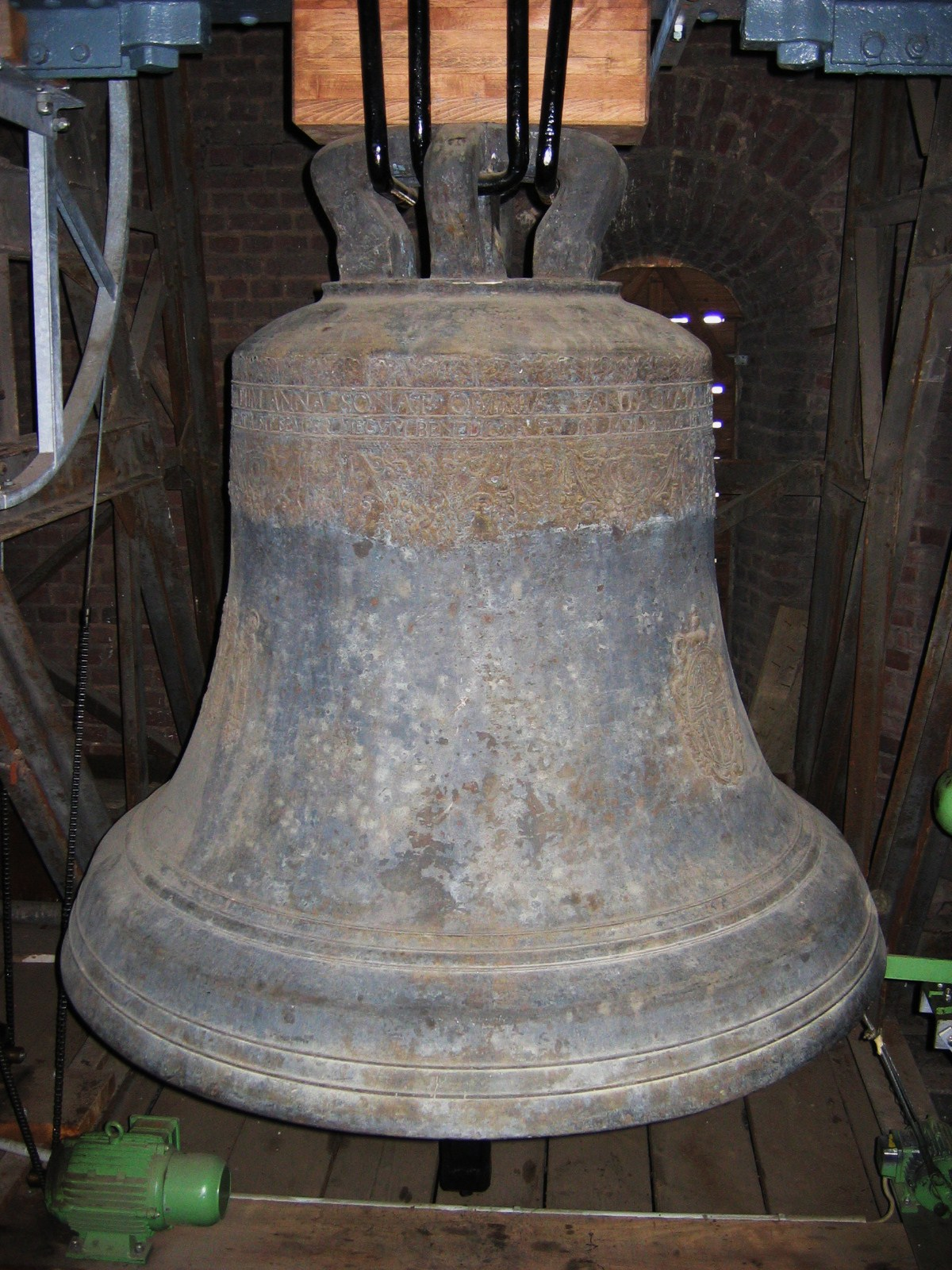 Die große St.-Anna-Glocke von St. Heribert in Köln-Deutz.